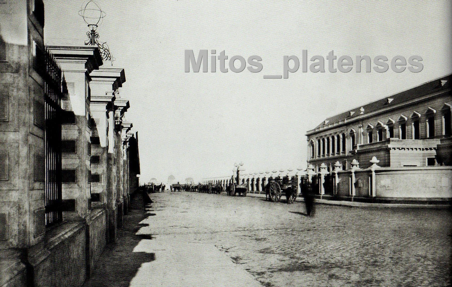 Diagonal 80 y calle 49. A la izquierda se ven las rejas que separaban la diagonal de las vias del tren